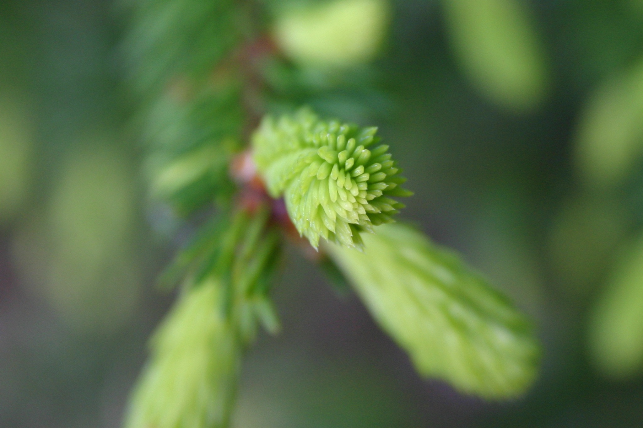 Picea abies, detail